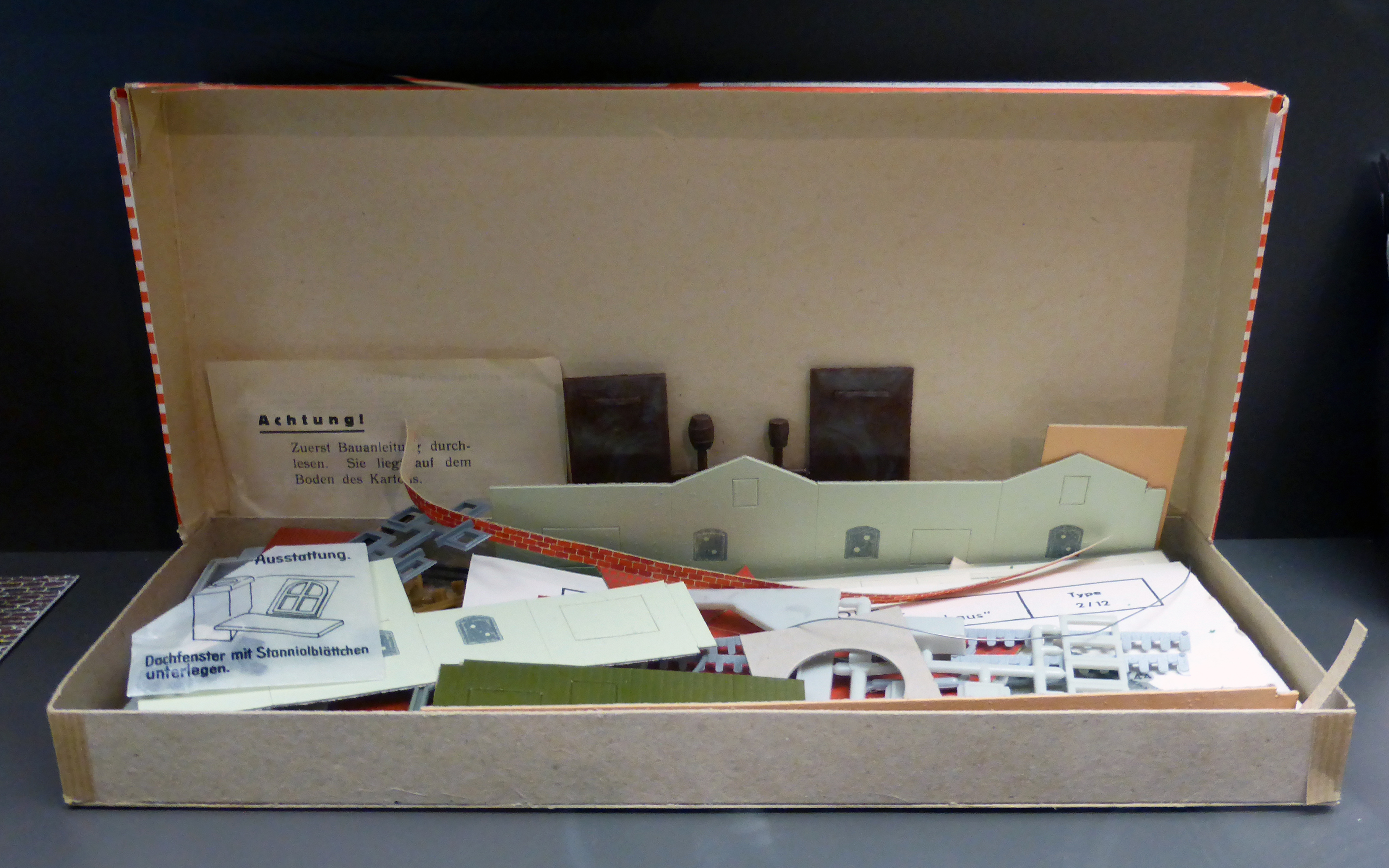 Auhagen-Bausatz. Ausgestellt im Museum sächsisch-böhmisches Erzgebirge in Marienberg.